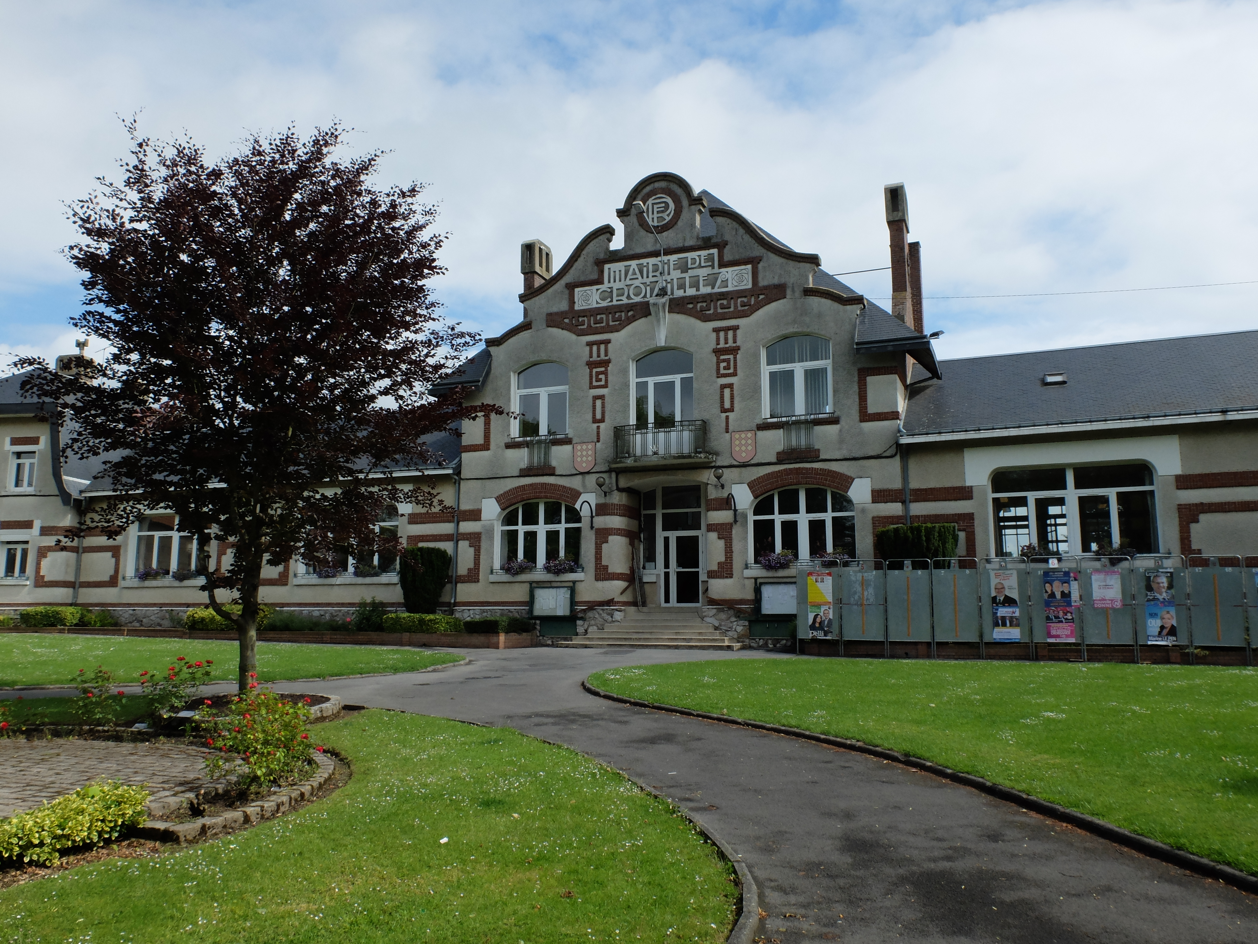 Vue de la mairie de Croisilles (62).